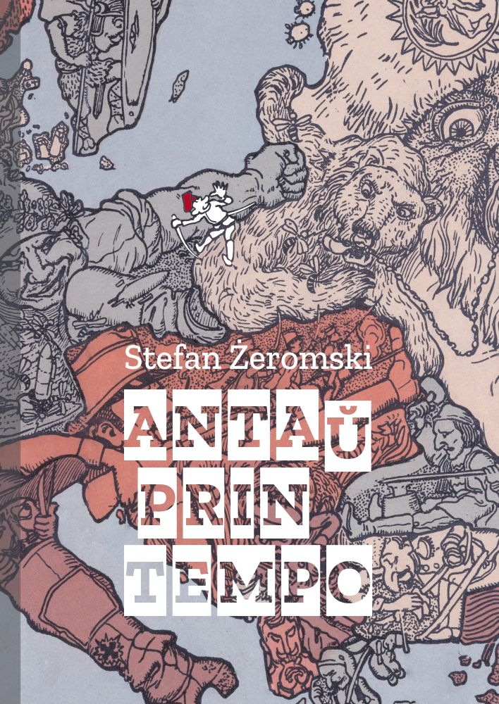 Kovrilo de la libro "Antaŭprintempo" de Stefan Żeromski, trad. Tomasz Chmielik, eld. Dokumenta Esperanto-Centro, Bjalistoka Esperanto-Societo, Libro-Mondo, Ars Libri; aŭtoro de la kovrilo: Przemysław Wierzbowski